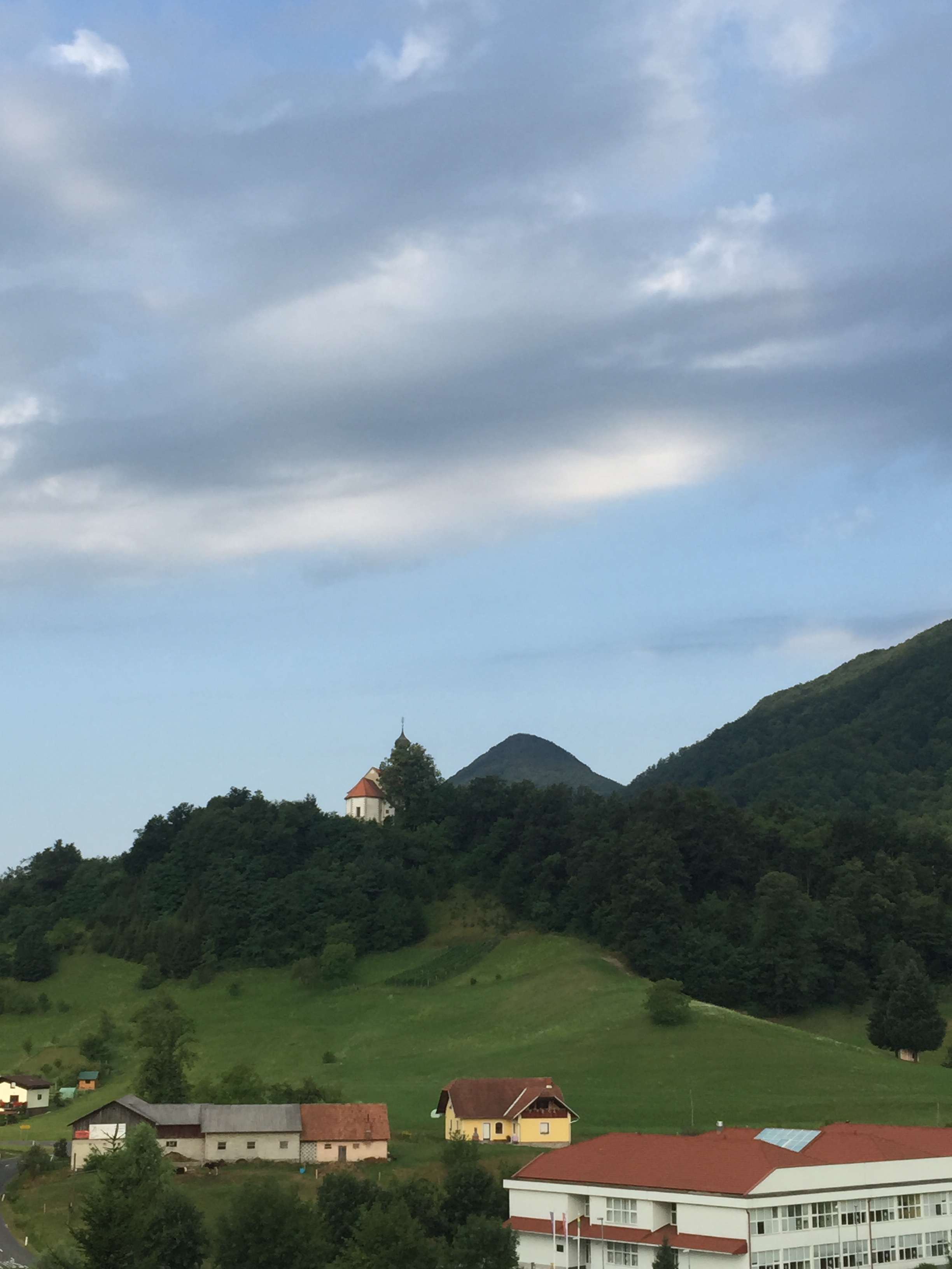 Žetale, Slovenia